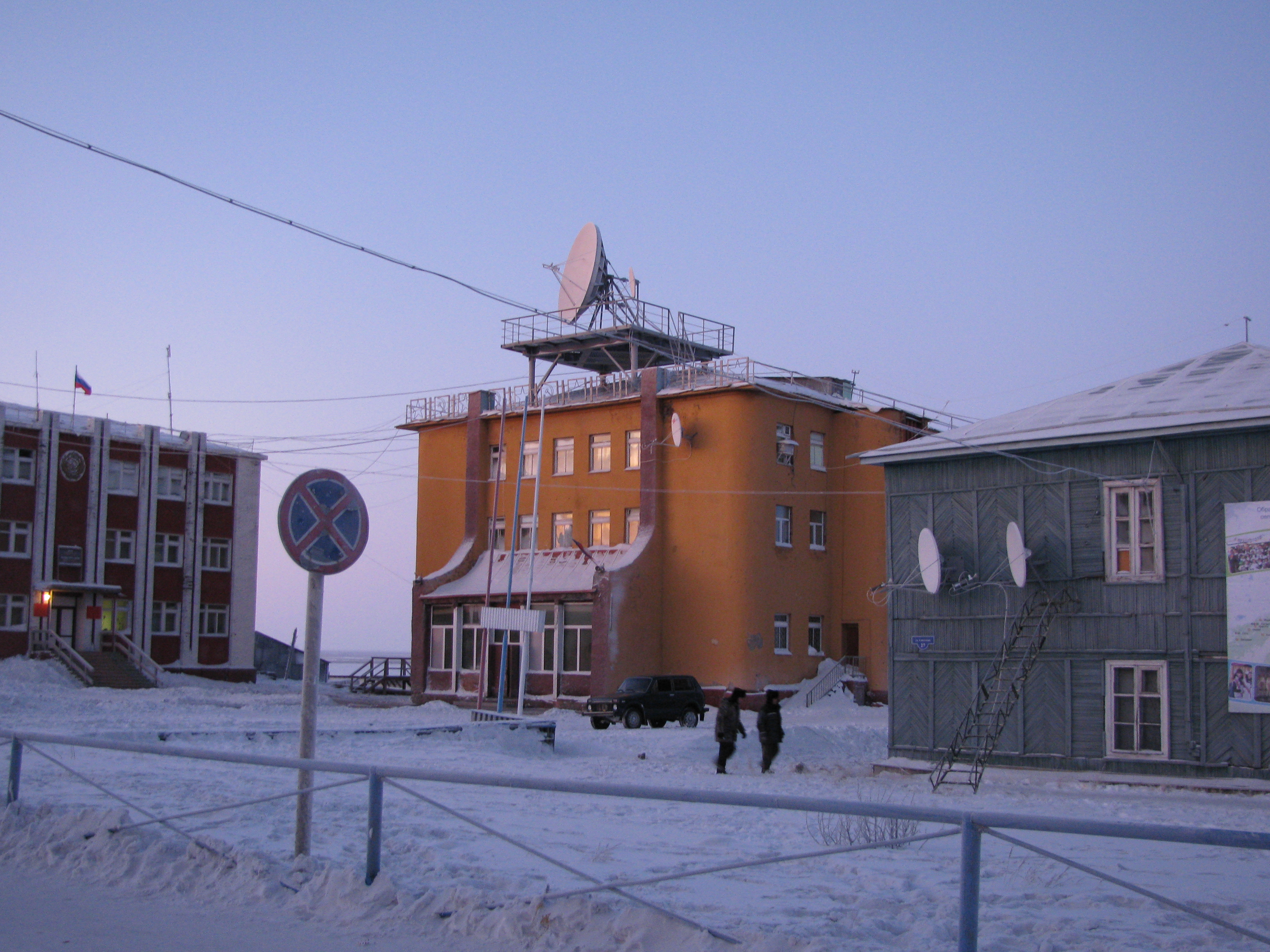 Местная почта 647460.